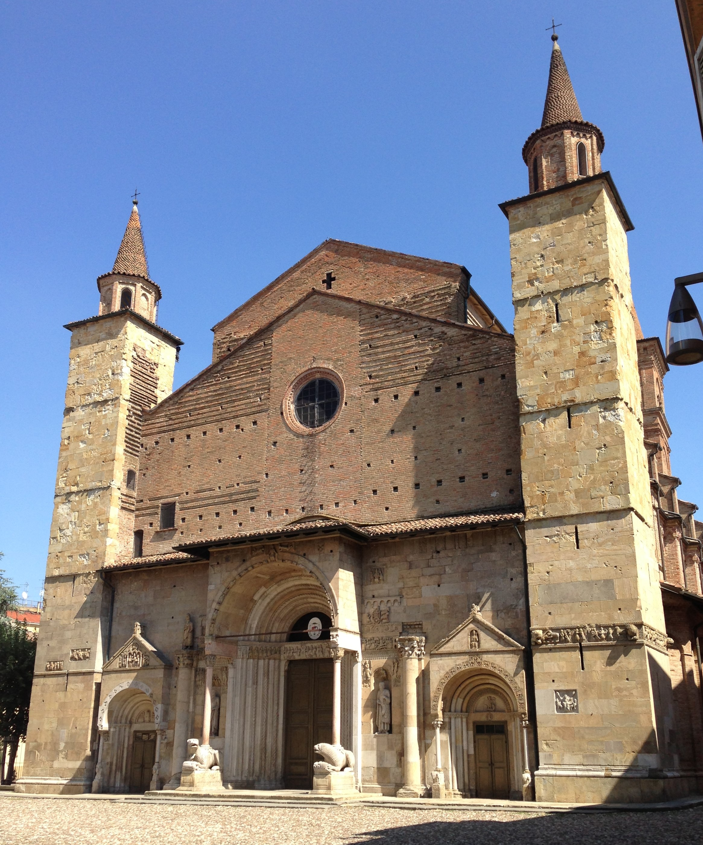 Duomo en Fidenza